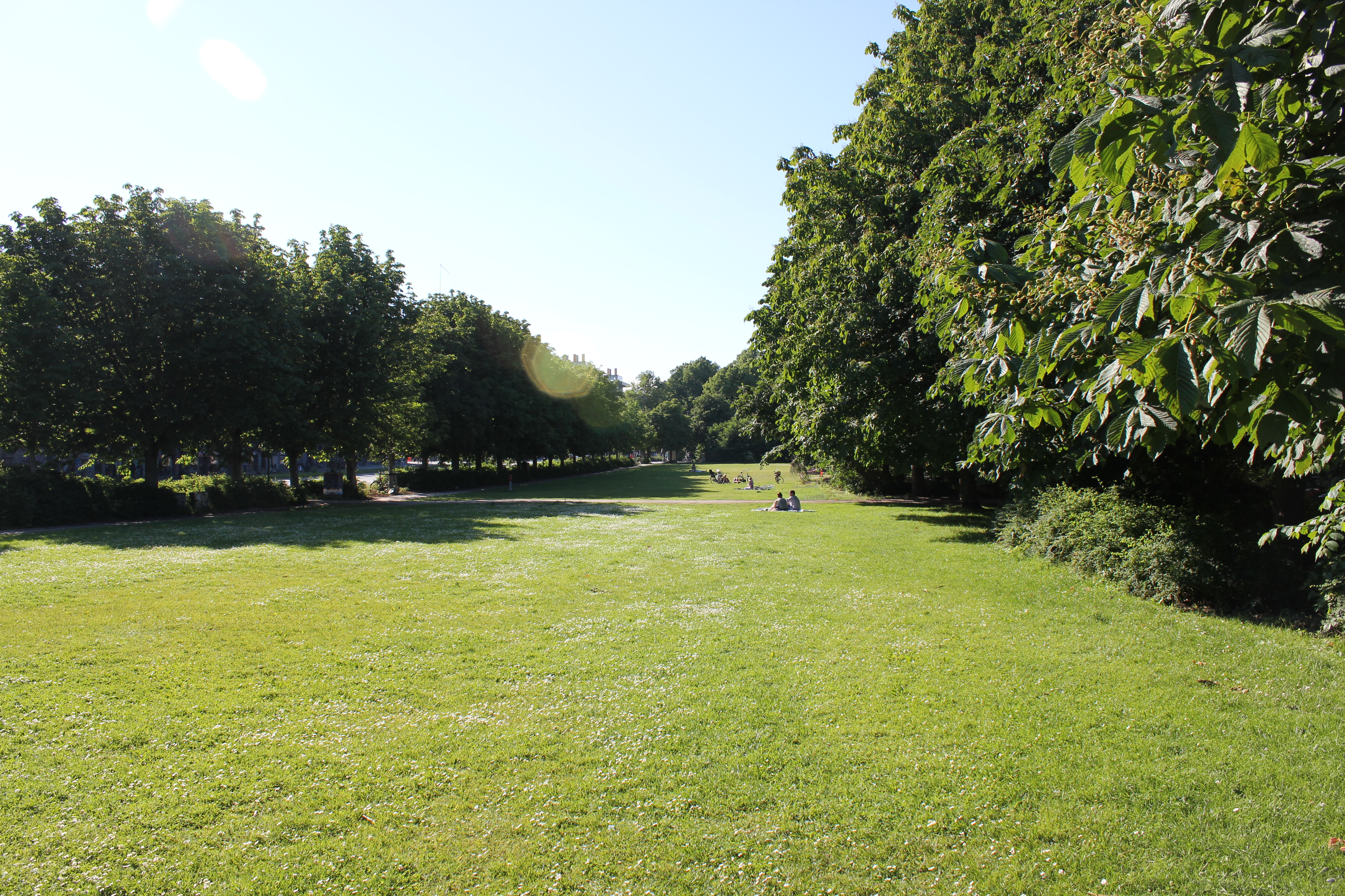 Fredens Park in Copenhagen